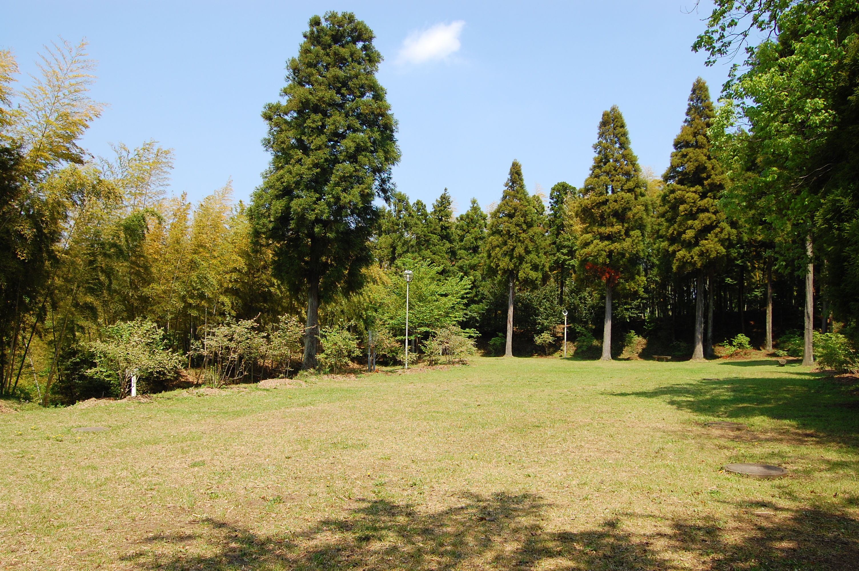 真里谷城跡。城の本丸（主郭）に辺り、千畳敷と呼ばれている。現在は木更津市立少年自然の家の自由広場として利用。